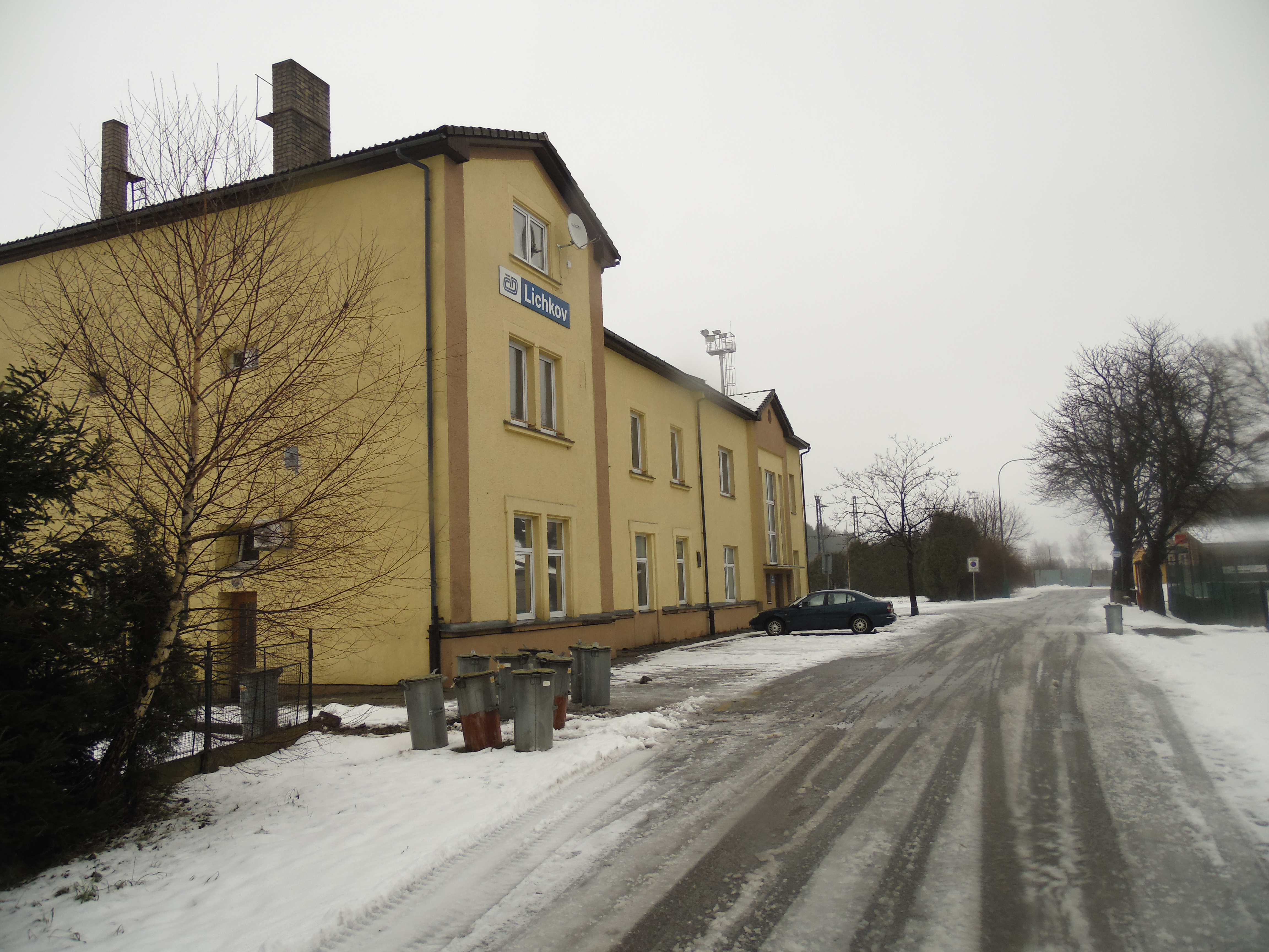 561 68 Lichkov, Czech Republic